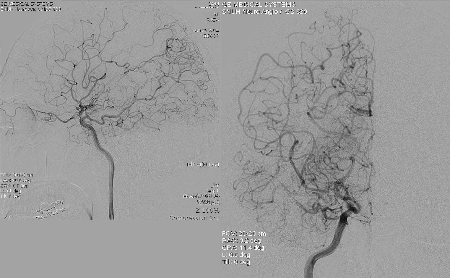 전면상과 측면상의 우측내경동맥 혈관조영술